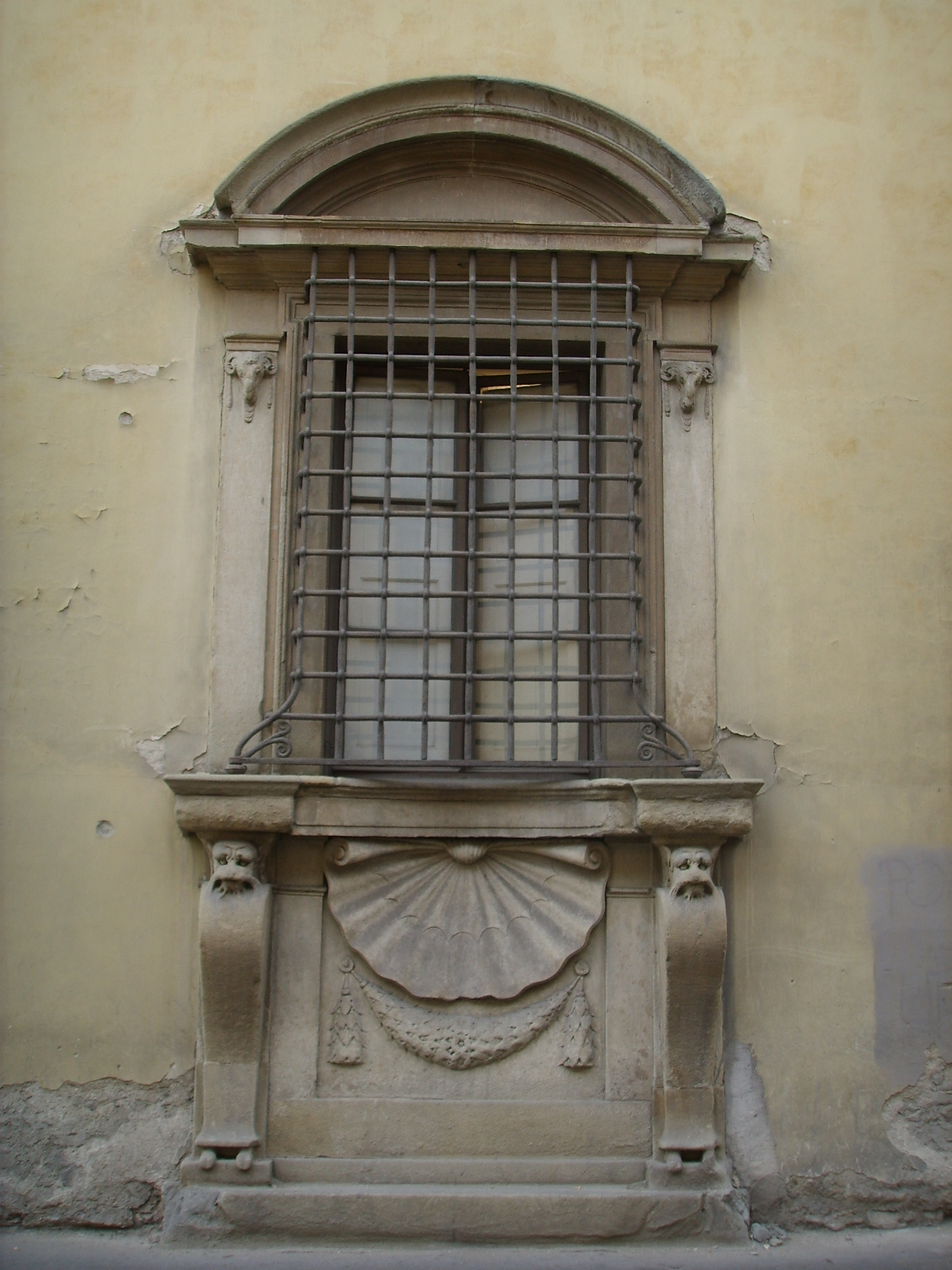 Casino di san marco, inginocchiata